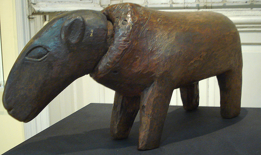 raro banco zoomórfico guarani